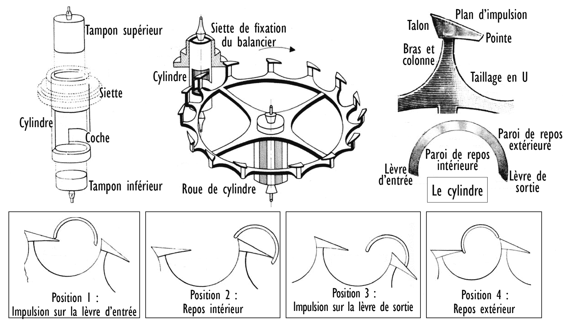 Échappement à cylindre (schéma)